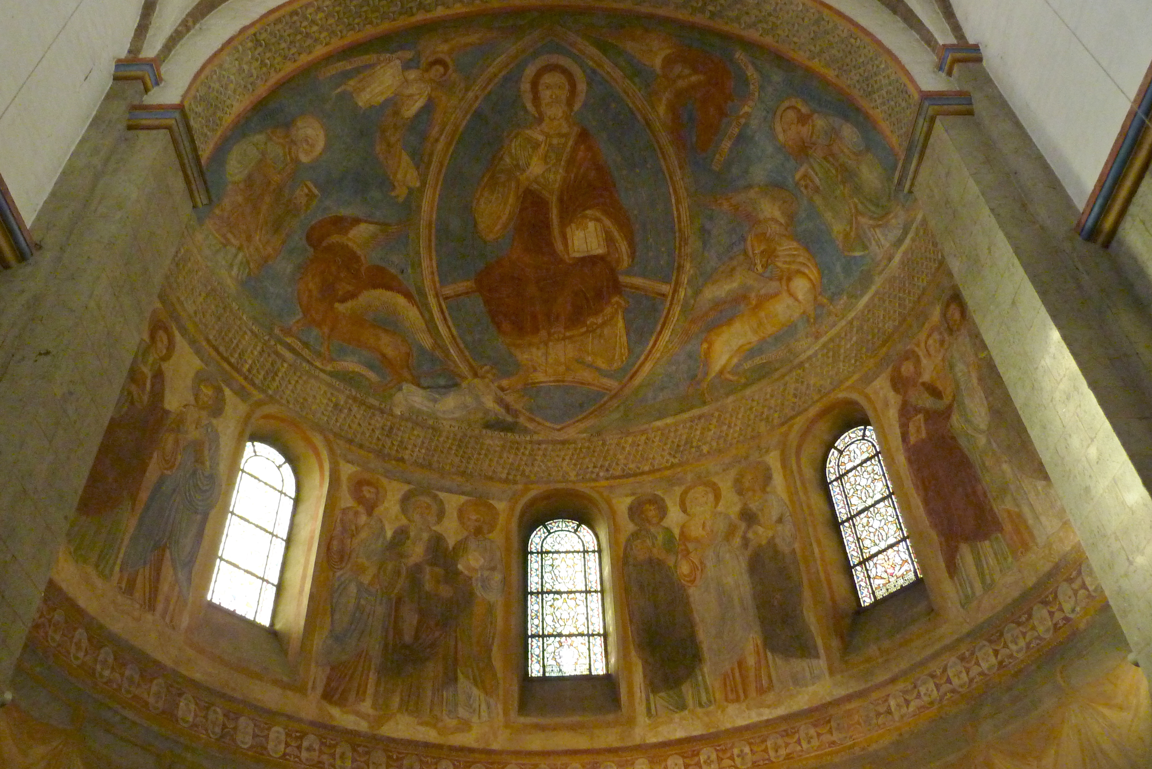 Katholische Kirche St. Maria Magdalena und St. Andreas des ehemaligen Prämonstratenser-Klosters Knechtsteden in Dormagen im Rhein-Kreis Neuss (Nordrhein-Westfalen), Fresko in der Westapsis, mehrfach restauriert; Darstellung: Majestas Domini, umgeben von den Evangelistensymbolen, links der Apostel Petrus, rechts der Apostel Paulus, zu Füßen Christi der Stifter Albert von Aachen, zwischen den Fenstern Apostel